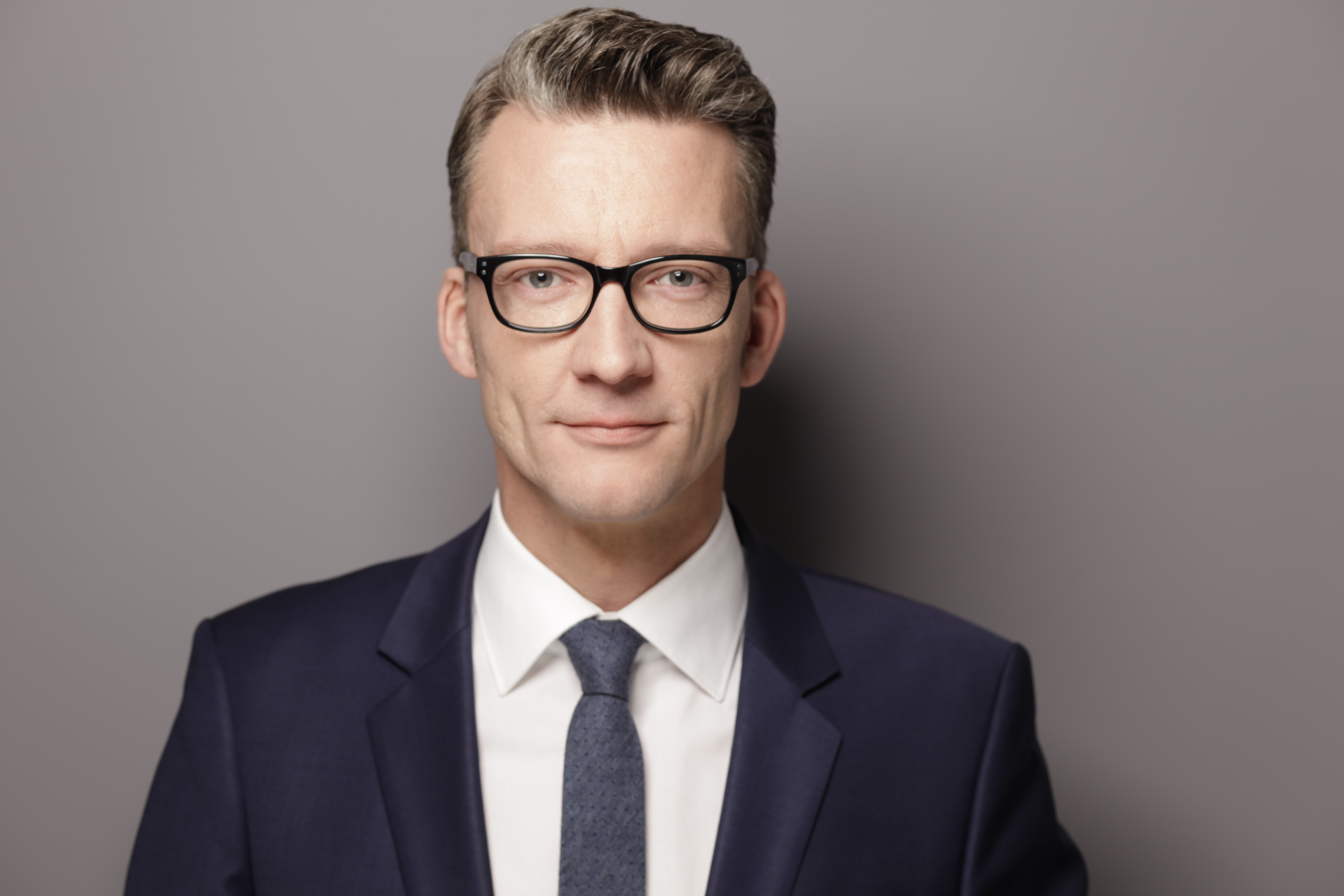 Sven Wolf / Portrait